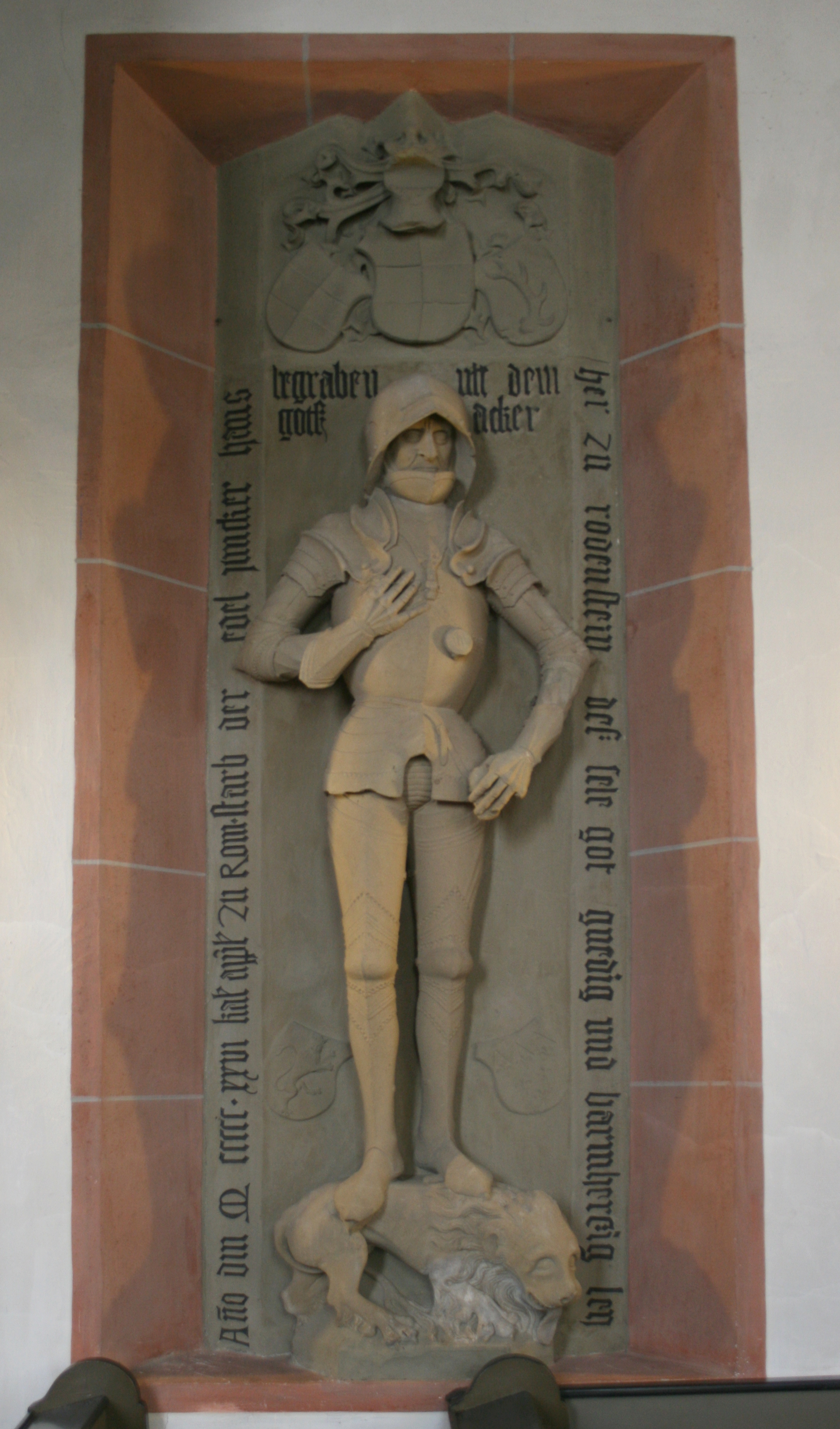 Kenotaph Hans' des Älteren von Rodenstein in der Evangelischen Kirche Fränkisch-Crumbach.